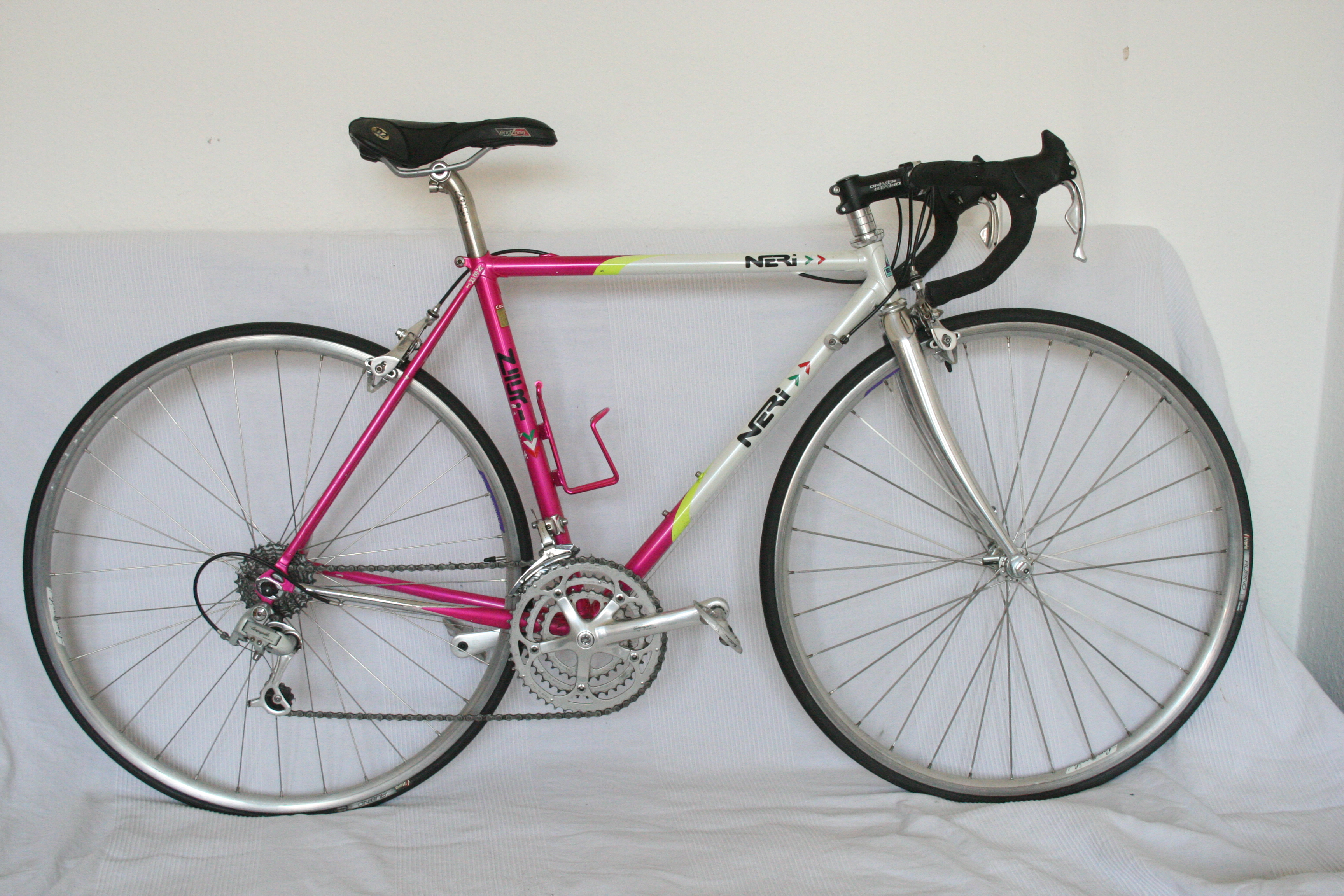 NERI Road Bike